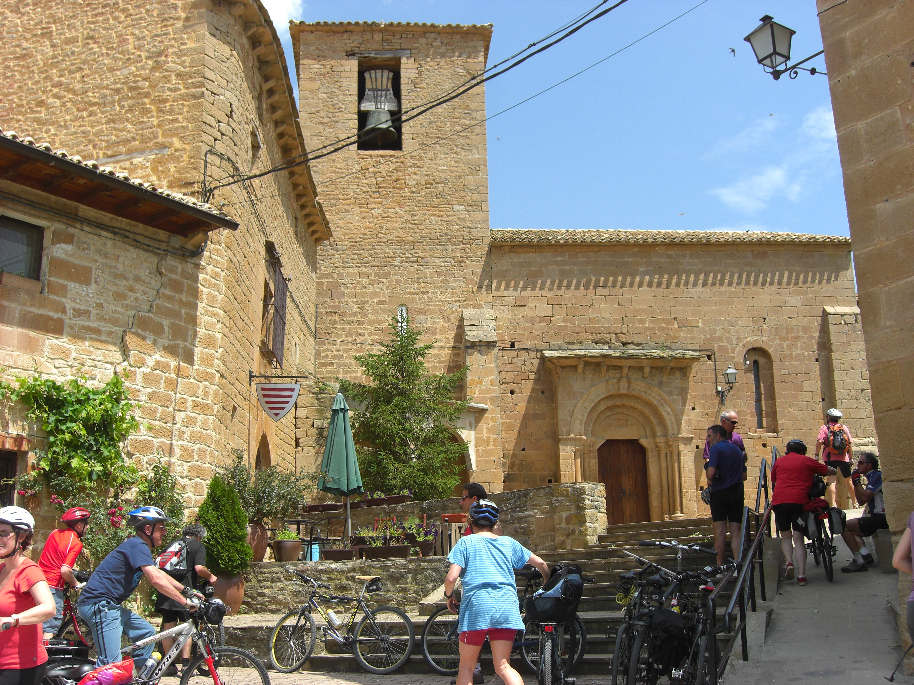 Orisoaingo ikuspegia.